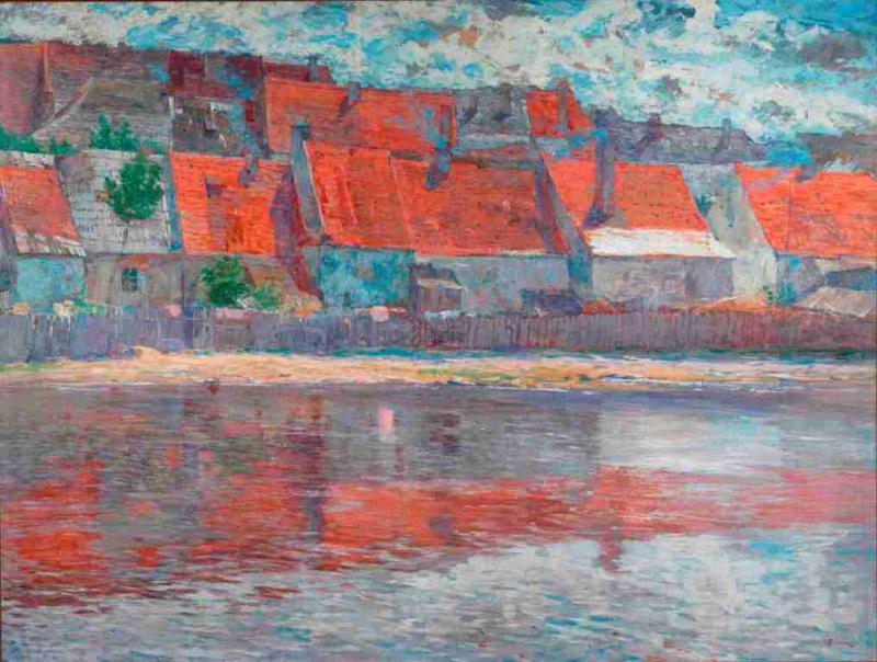 Antonín Slavíček - Červené střechy, 1900 - syntonos, lepenka, 89 x 118 cm. Národní galerie, Praha.